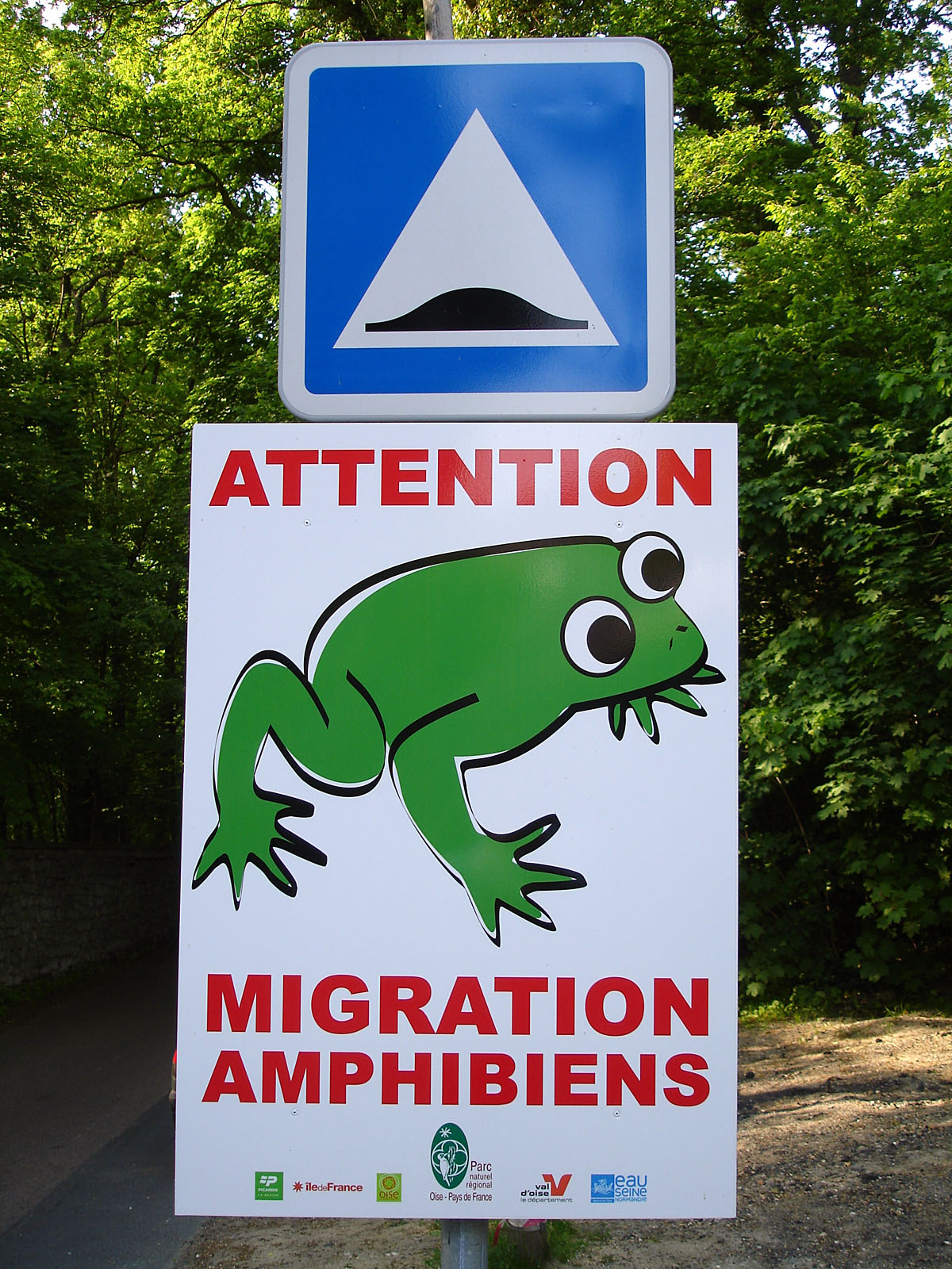 Panneau avertissant de la migration d'amphibiens sur la route des étangs de Commelles à Coye-la-Forêt, Oise, France.